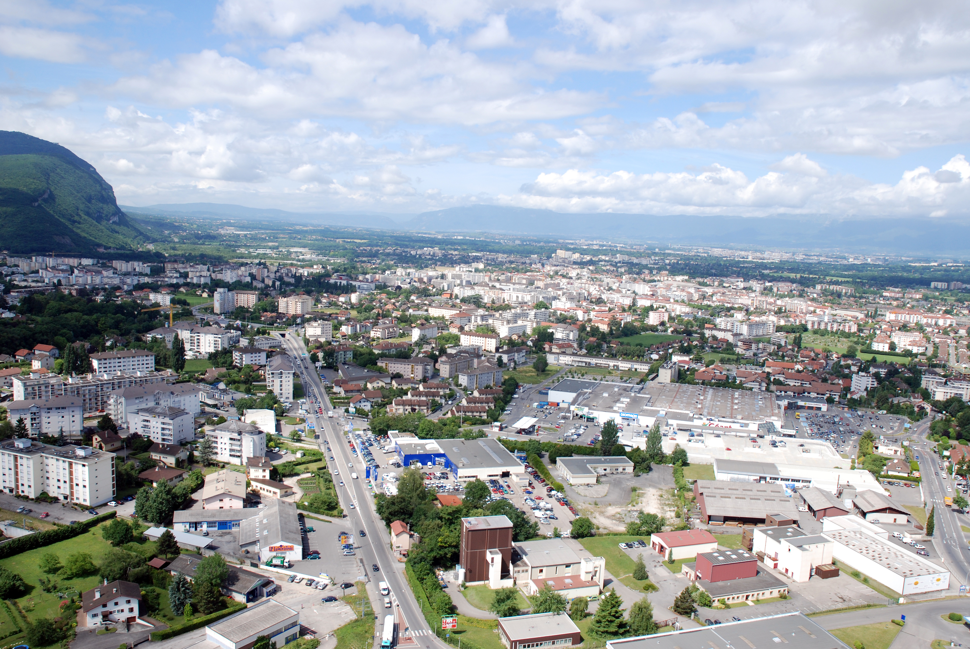 La ville d'Annemasse dans le département français de la Haute-Savoie vue du ciel.